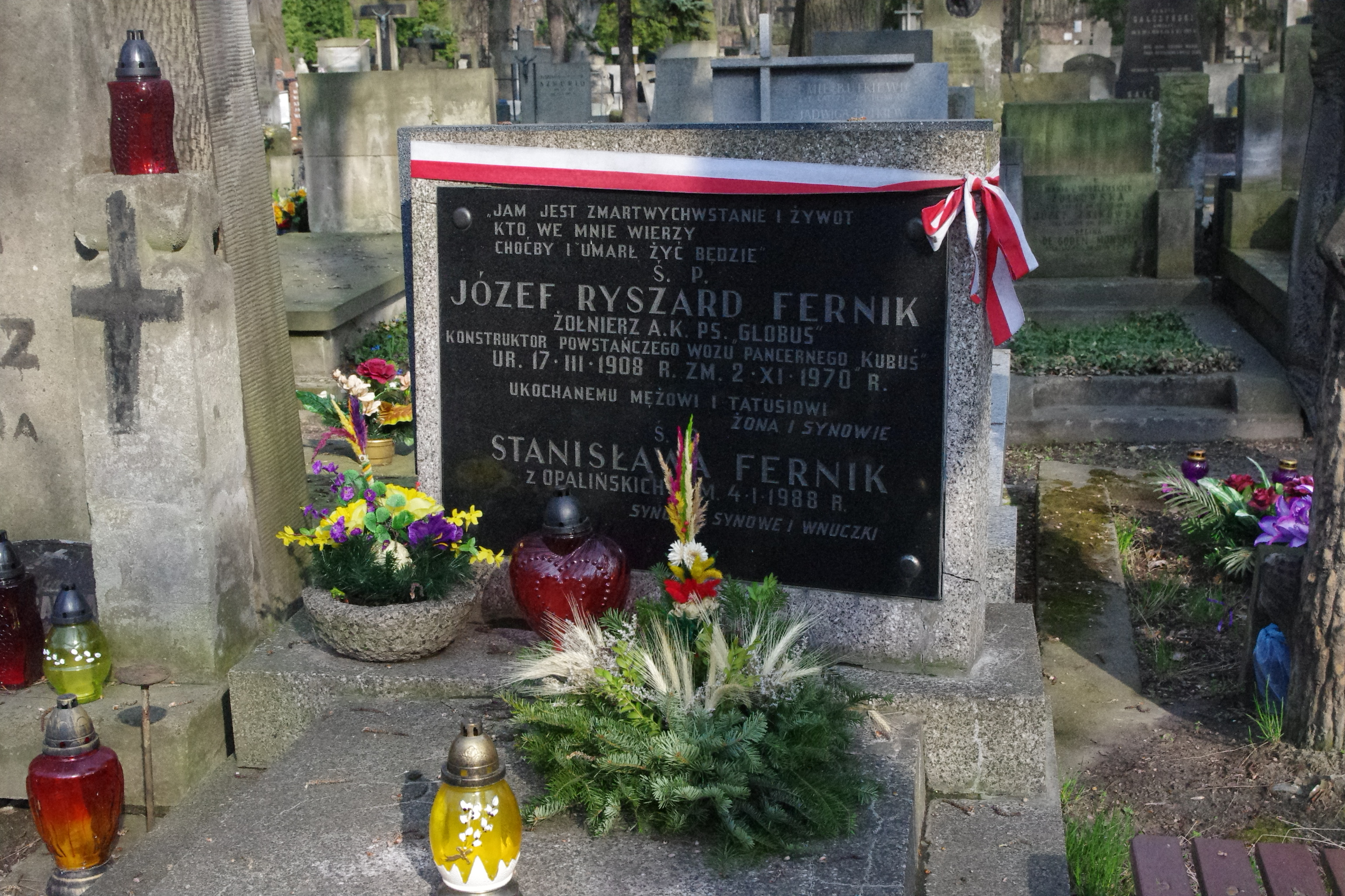 Grób Józefa Ryszarda Fernika – konstruktora powstańczego wozu pancernego „Kubuś” na Starych Powązkach w Warszawie (stan na kwiecień 2012)